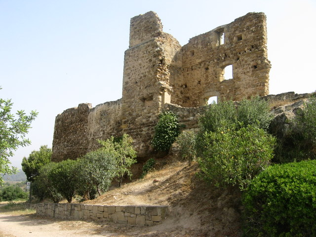 Castell-Ciuró a la comarca del Baix Llobregat - Catalunya